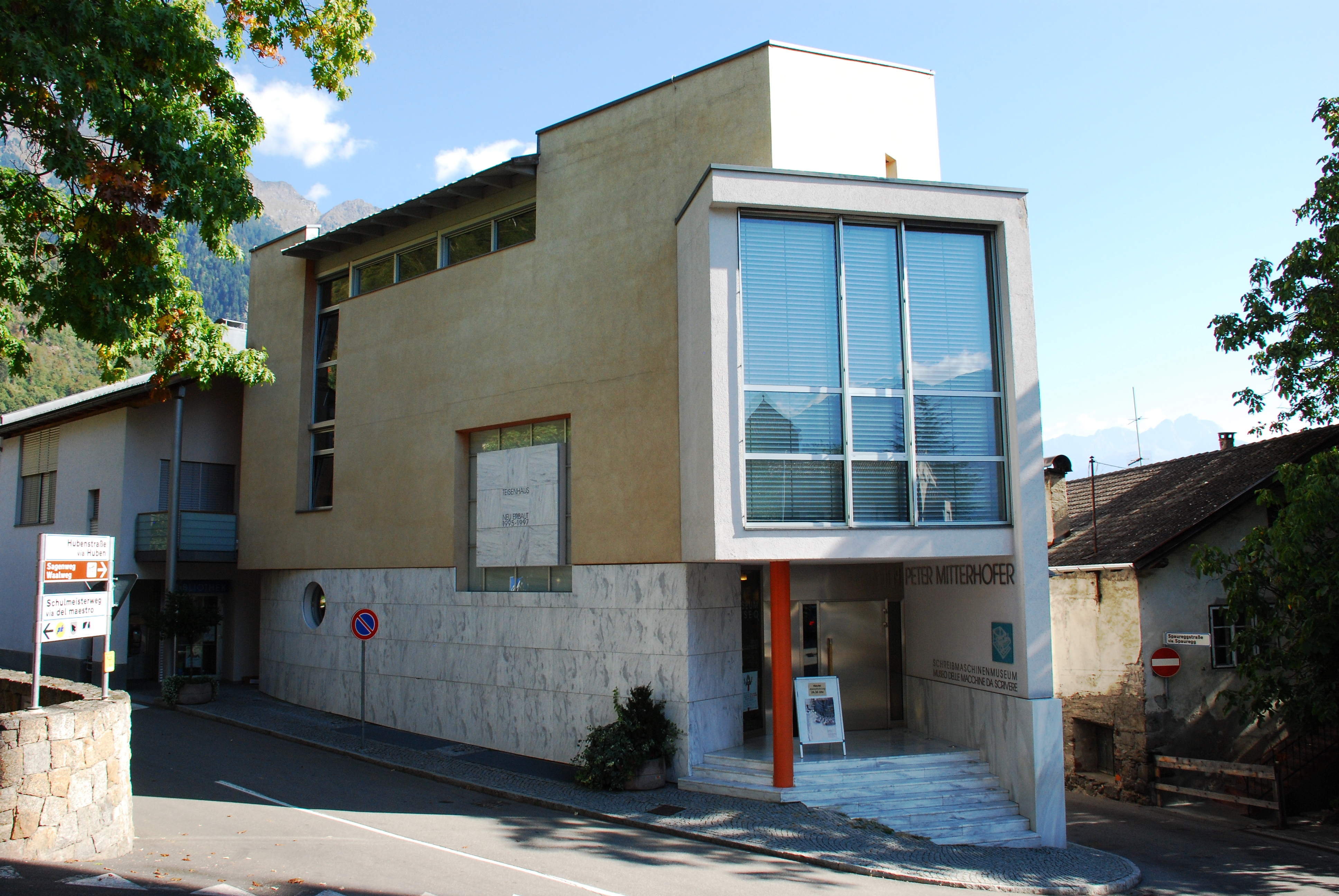 Gebäude des Schreibmaschinenmuseums in Partschins/Parcines, Vinschgau, Provinz Südtirol/Alto Adige, Italien.